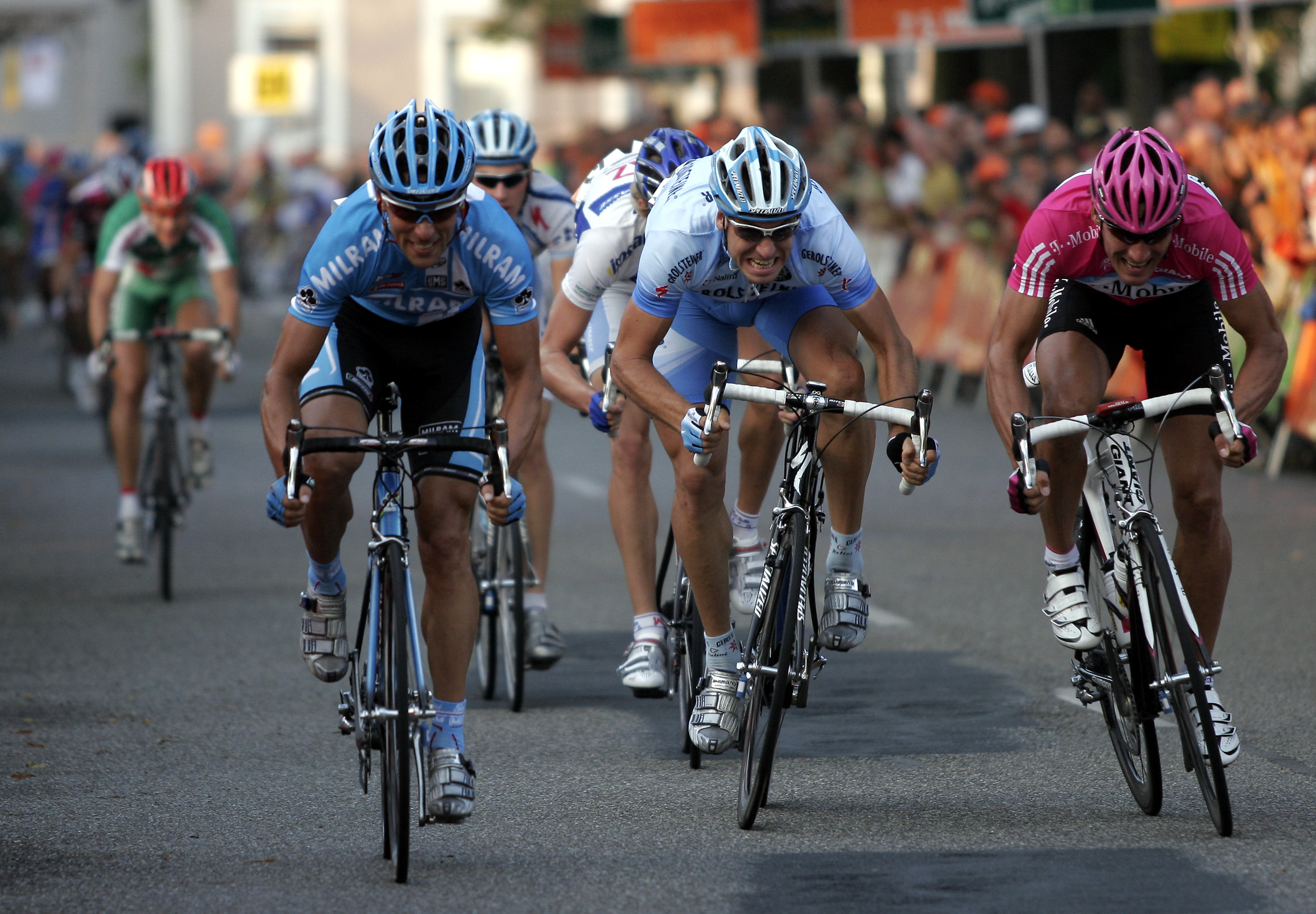 Sprintentscheidung beim Entega Grand Prix 2007 in Lorsch (Südhessen)